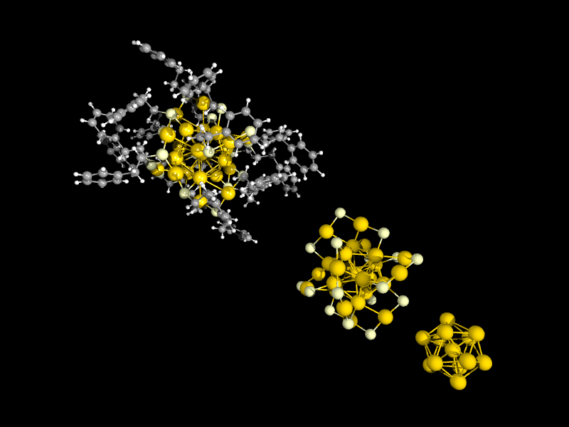 Visualisierung der Kristallstruktur des Au25R18 minus Clusters. Der prominenteste Vertreter thiolatgeschützter Goldcluster mit Core-Shell Struktur. Oben links: vollständige Struktur (weiß H, grau C, hellgelb S, gelb Au), mitte: nur Au und S, unten links: nur der ikosaedrische Au13 Kern.